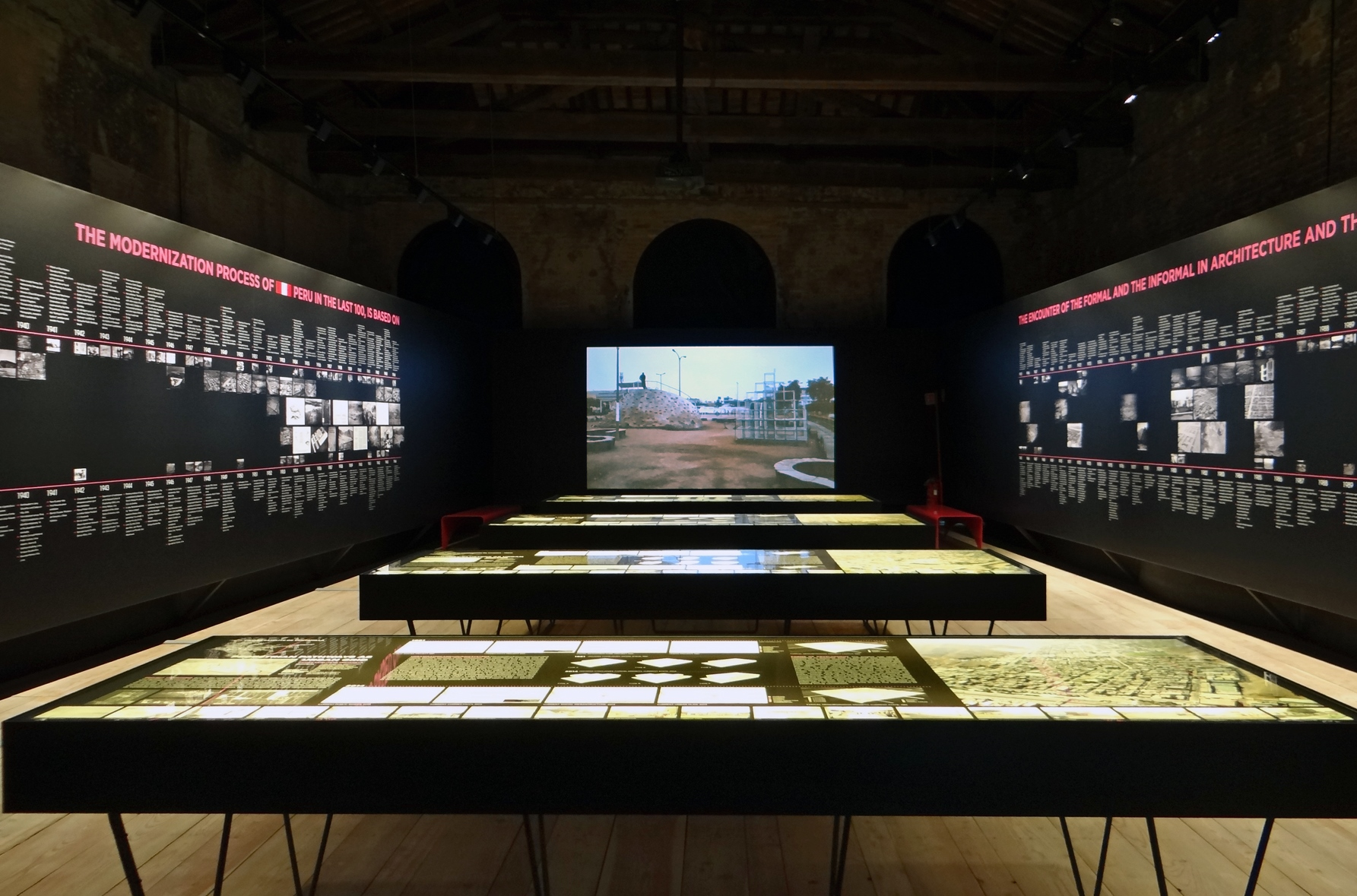 in/formal : urban encounters for the next 100 Le pavillon du Pérou présente une histoire de l'architecture de ce pays conformément au thème "Absorbing modernity 1914-2014" défini par le commissaire général Rem Koolhaas de la biennale d'architecture 2014. L'exposition du pavillon reprend comme beaucoup d'autres la frise chronologique des réalisations les plus significatives du pays accompagnées par des plans, documents et photographies. Site de la Biennale d'architecture 2014